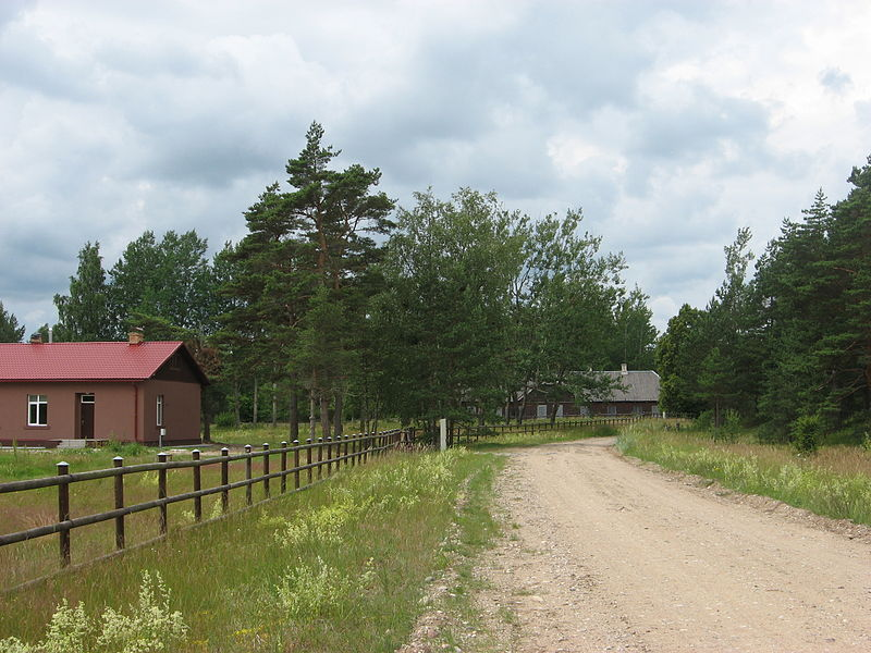 Pavadinimas: lv Lūžņa Data: 2013-10-12 16:10:04 Šaltinis: panoramio Autorius: alinco_fan